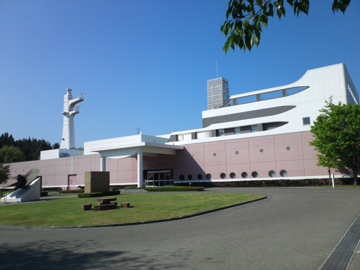 原子力船「むつ」の原子炉、制御室などの設備や資料、海洋地球研究船「みらい」に関する情報、科学体験設備などが展示されている。